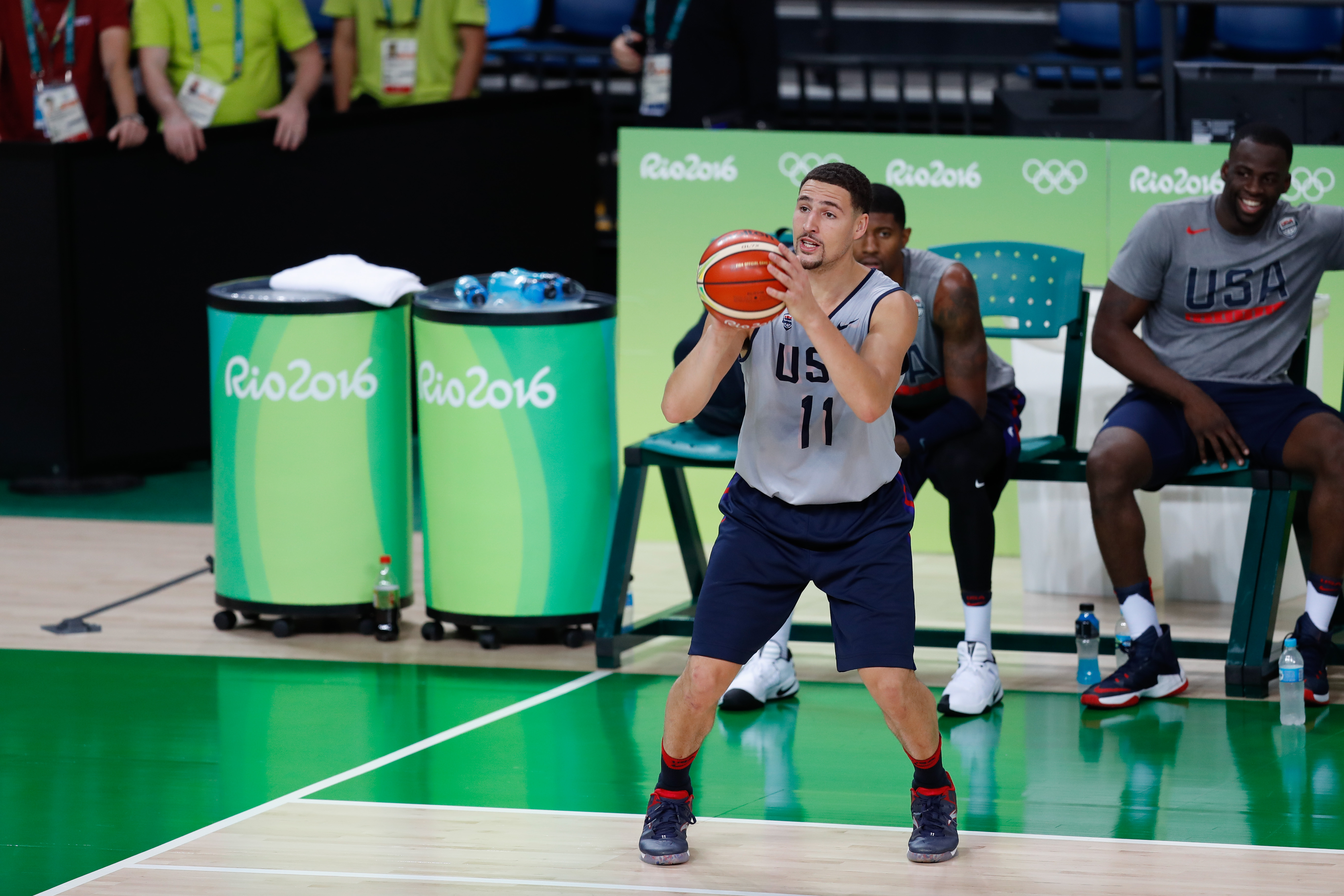 Rio de Janeiro - O armador Klay Thompson no treino da seleção de basquete dos Estados Unidos na Arena Carioca dos Jogos Rio 2016 (Fernando Frazão/Agência Brasil)